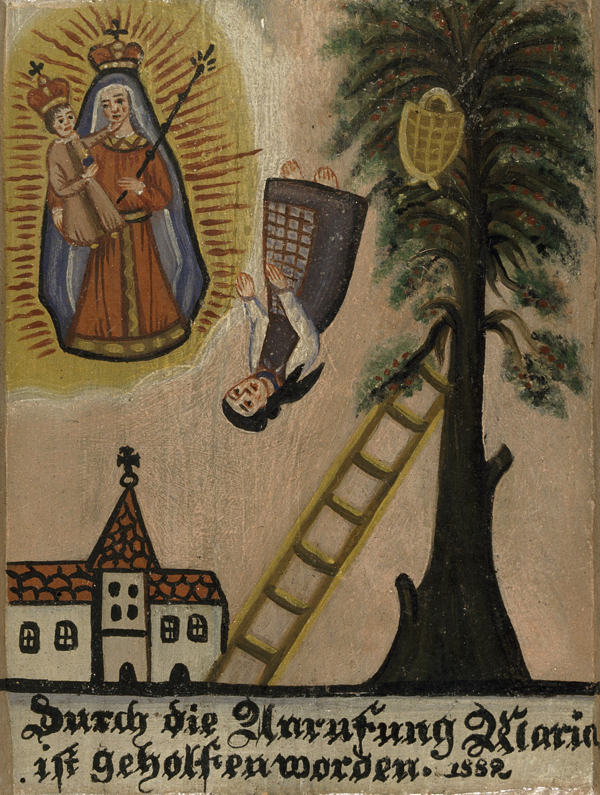 Museum Kloster Asbach (Zweigmuseum des Bayerischen Nationalmuseums); Sammlung Rudolf Kriss: Ölmalerei auf Holz, Niederbayern, 1882